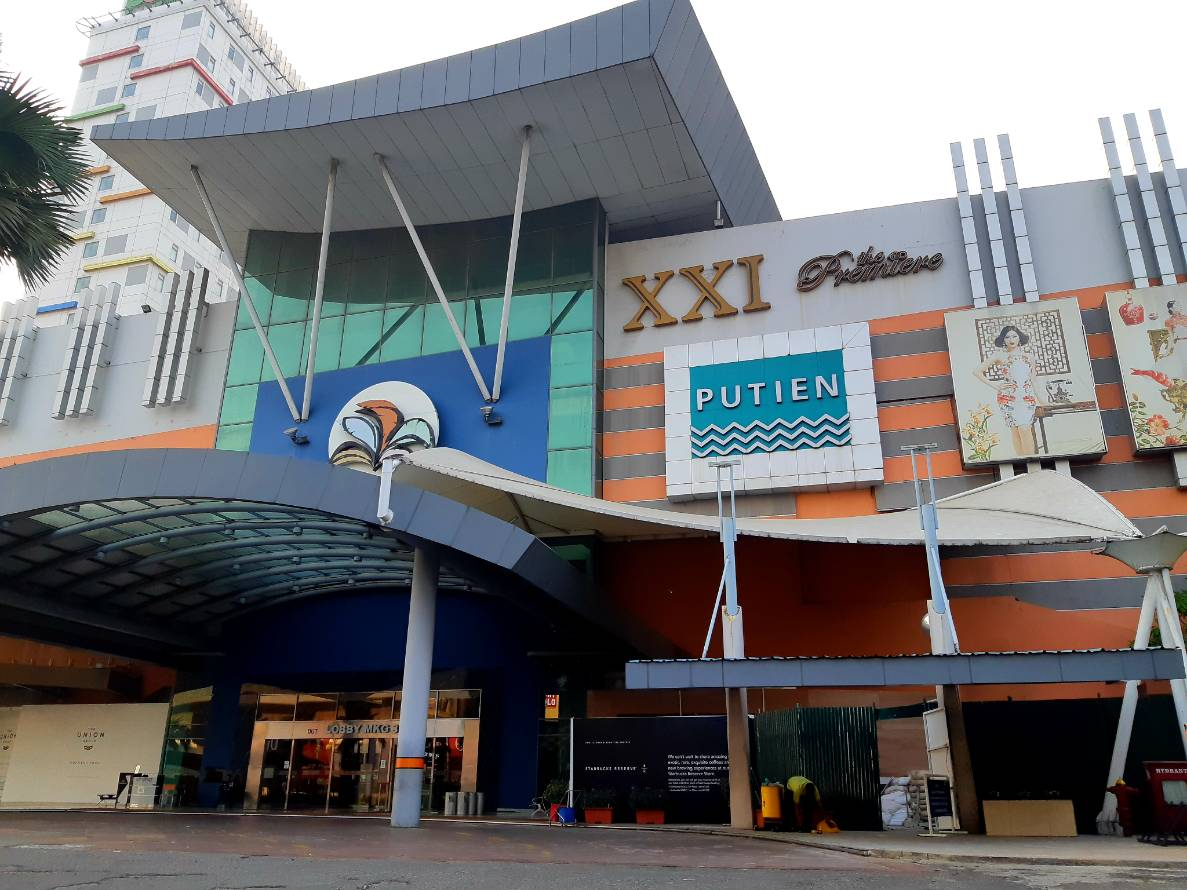 Tampak luar Mall Kelapa Gading 3